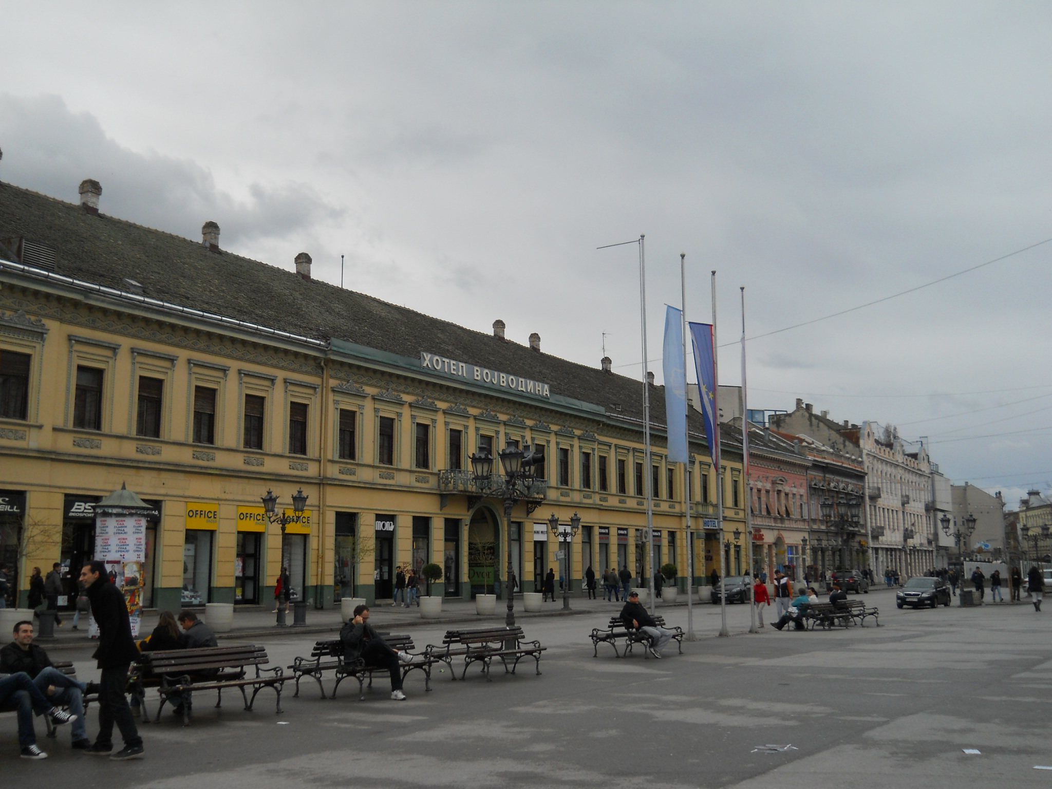 Újvidék - Hotel Vojvodina